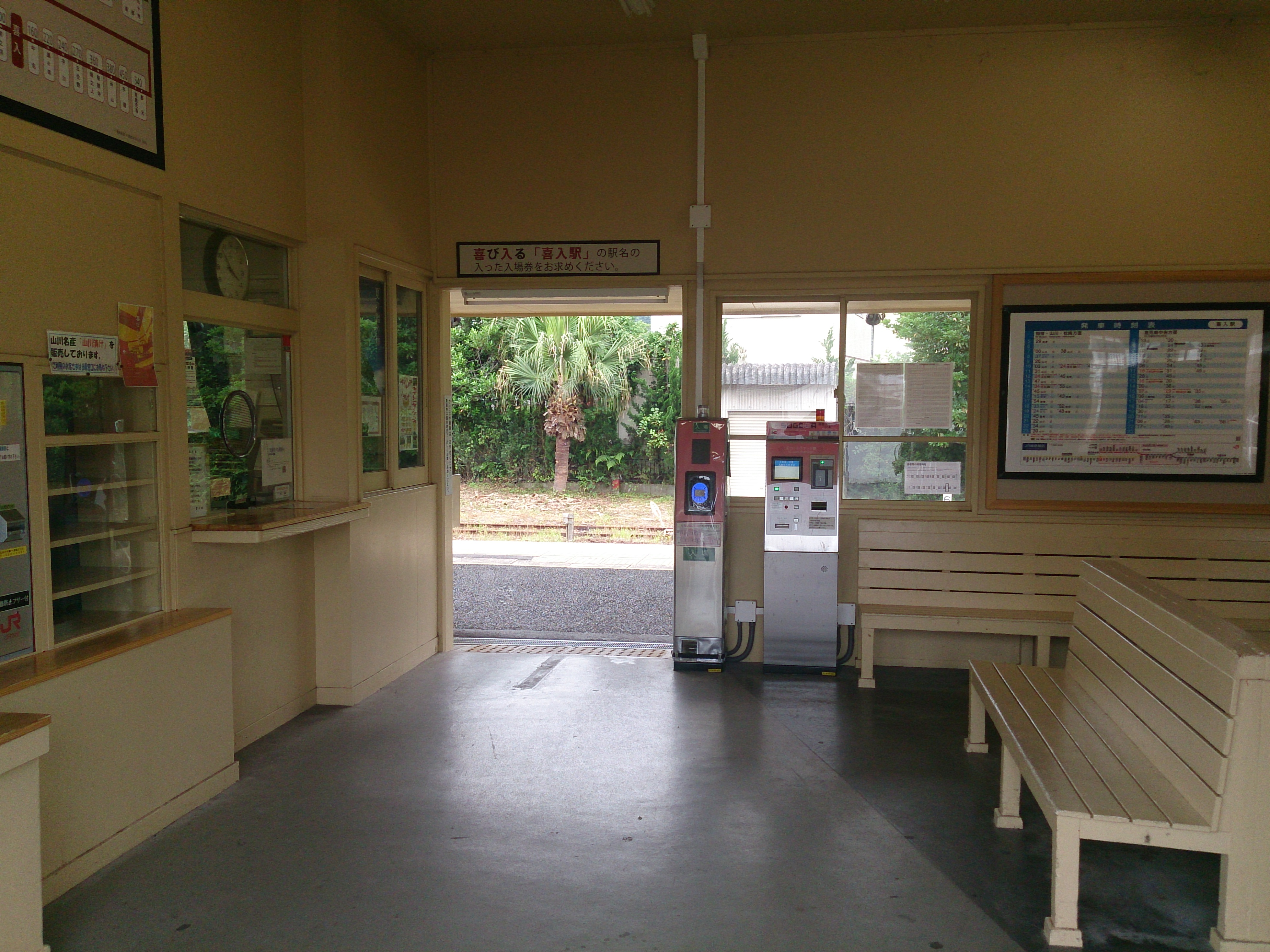 喜入駅駅舎内